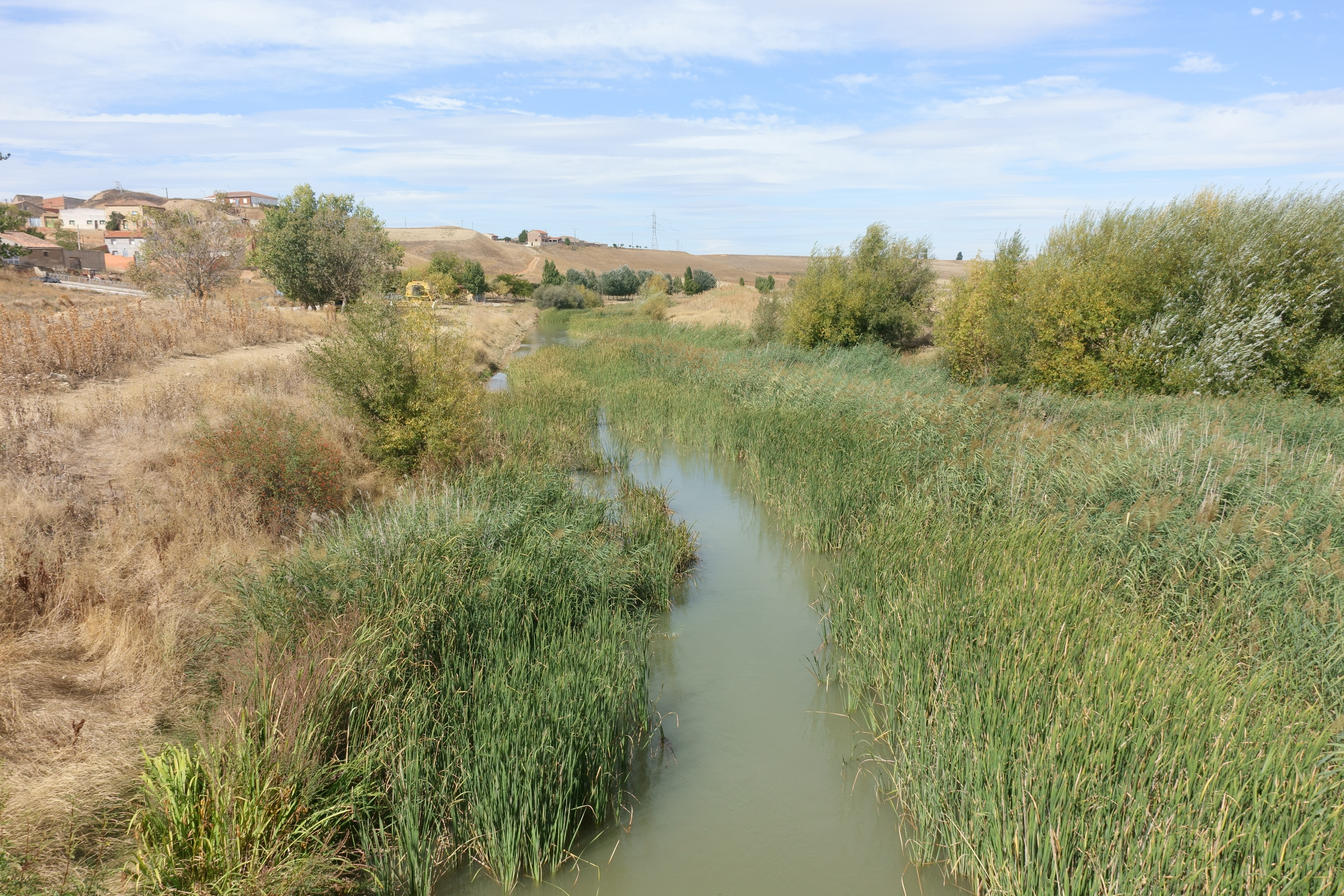 Río Valderaduey a su paso por Castronuevo (Zamora, España).